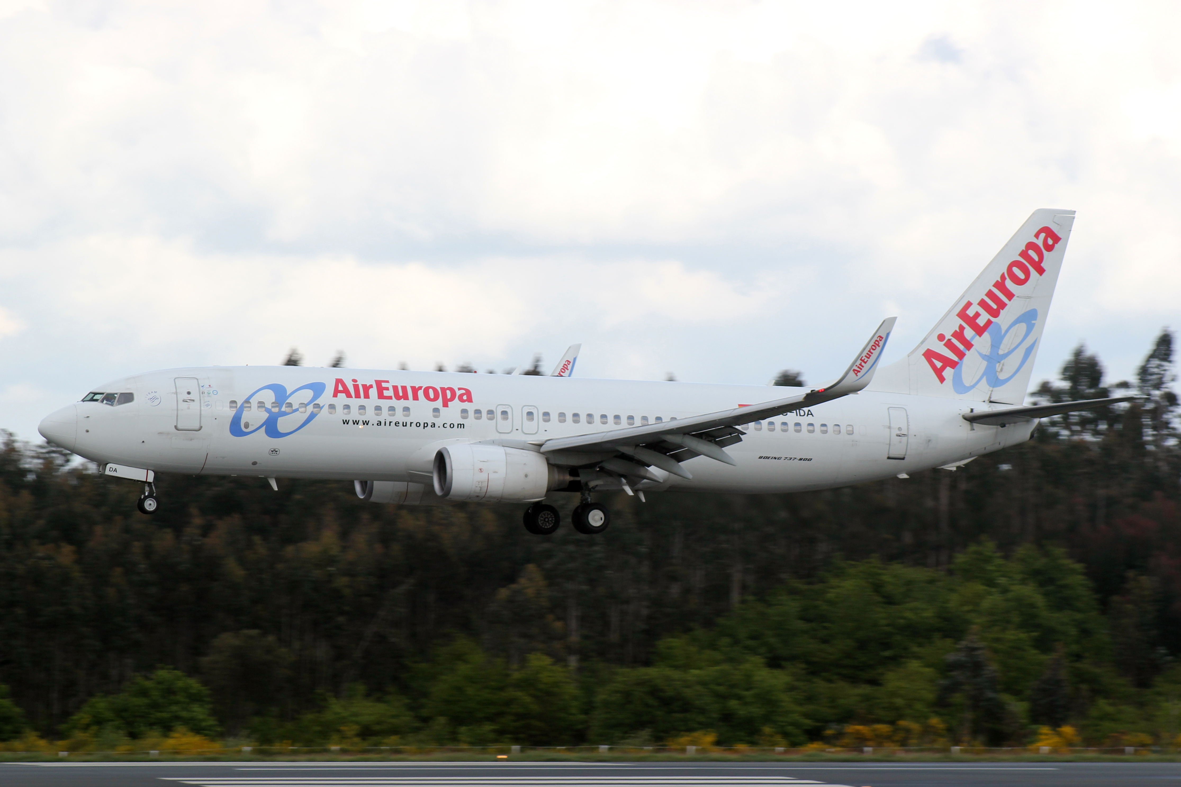 Boeing 737 de Air Europa aterrando no aeroporto de Santiago de Copostela.